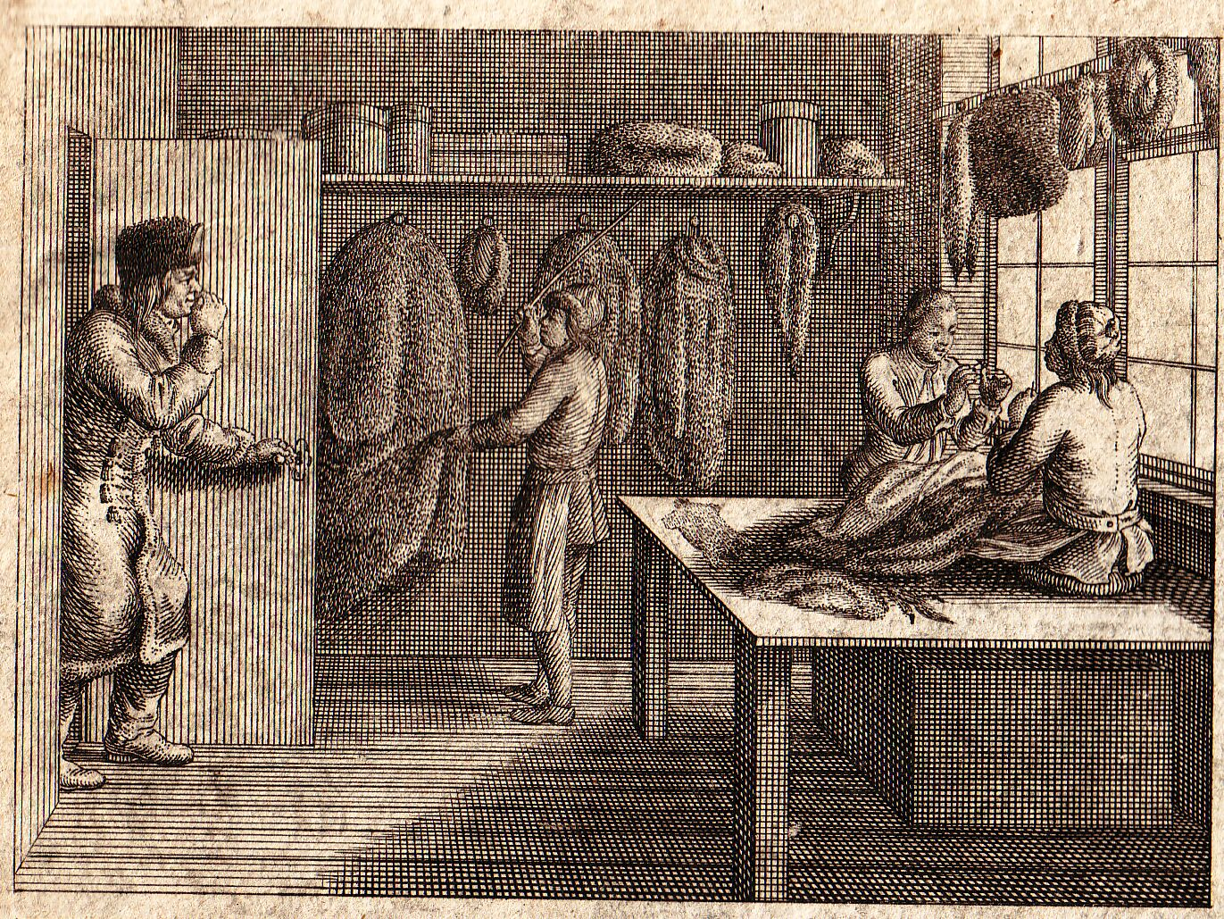 Kürschnerwerkstatt. Kupfer von Chodowiecki aus dem Basedow'schen Unterrichtsbuch um 1800. Auf dem Tisch zwei Gesellen, die einen Pelz vernadeln. Zur Tür herein kommt ein Kunde.[1]